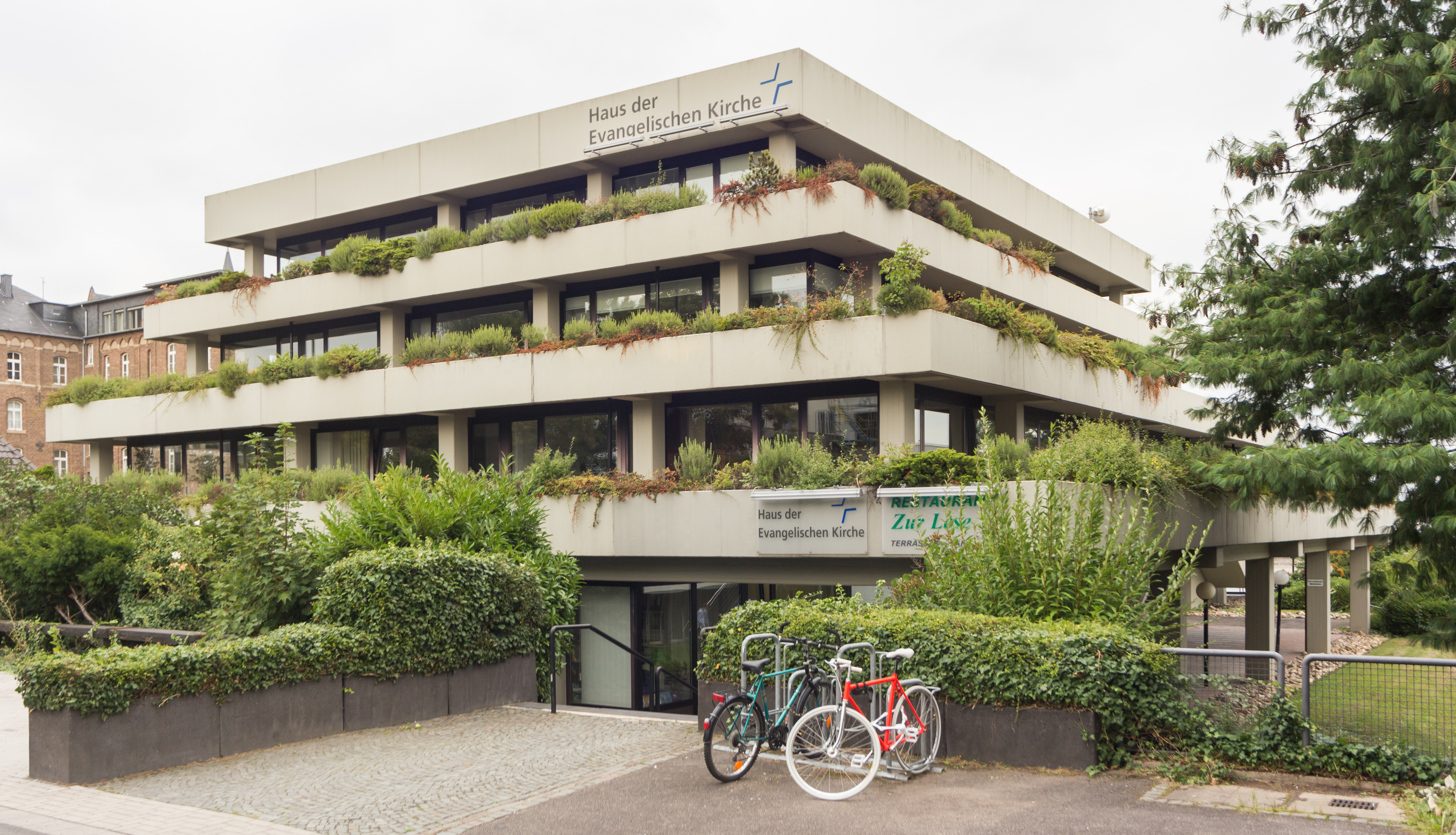 Haus der Evangelischen Kirche, Adenauerallee 37, Bonn-Südstadt: Blickrichtung Nordost